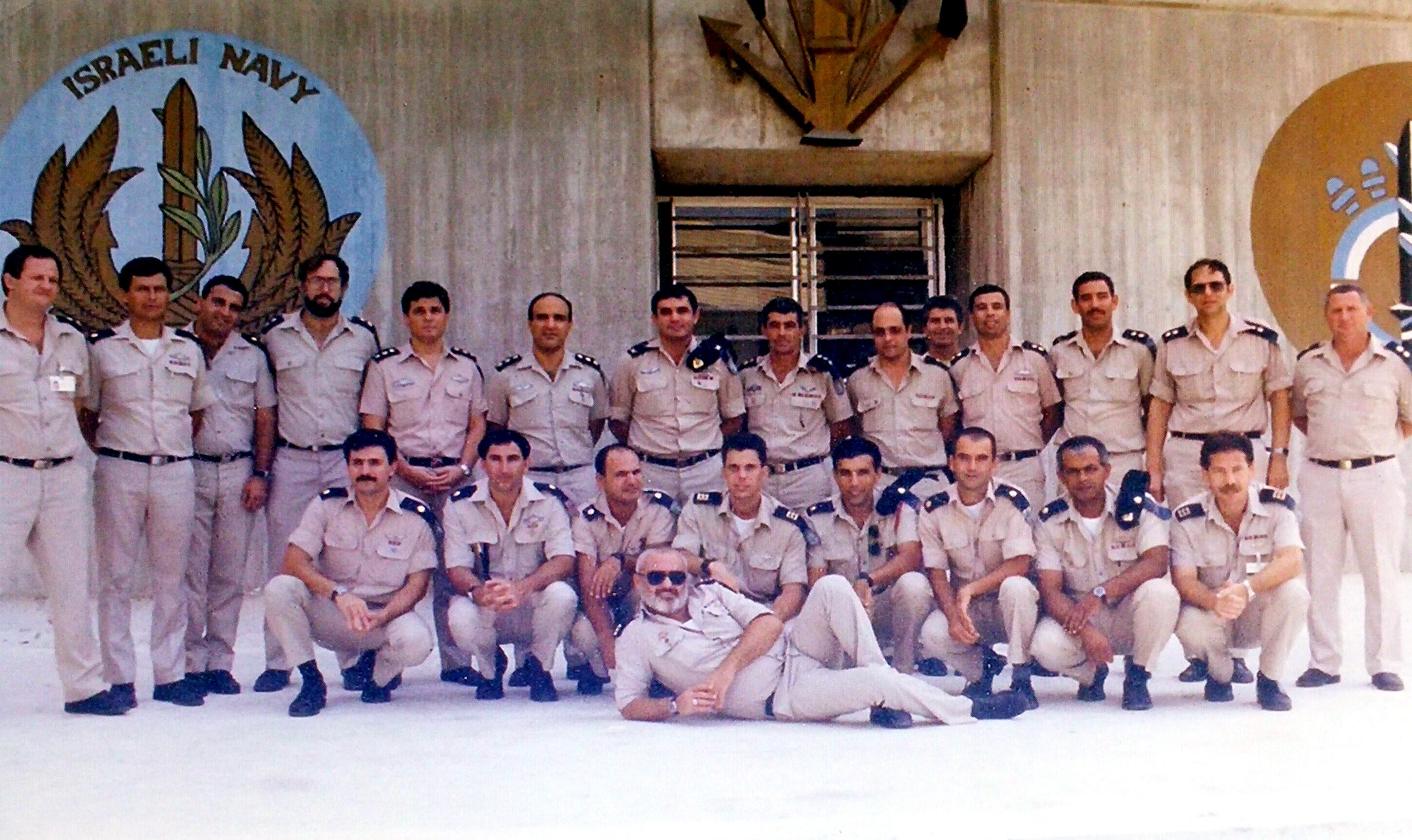 סגל בכיר מספן המודיעין במסהחלפת תפקידים בין רפי אפל וידידיה יערי